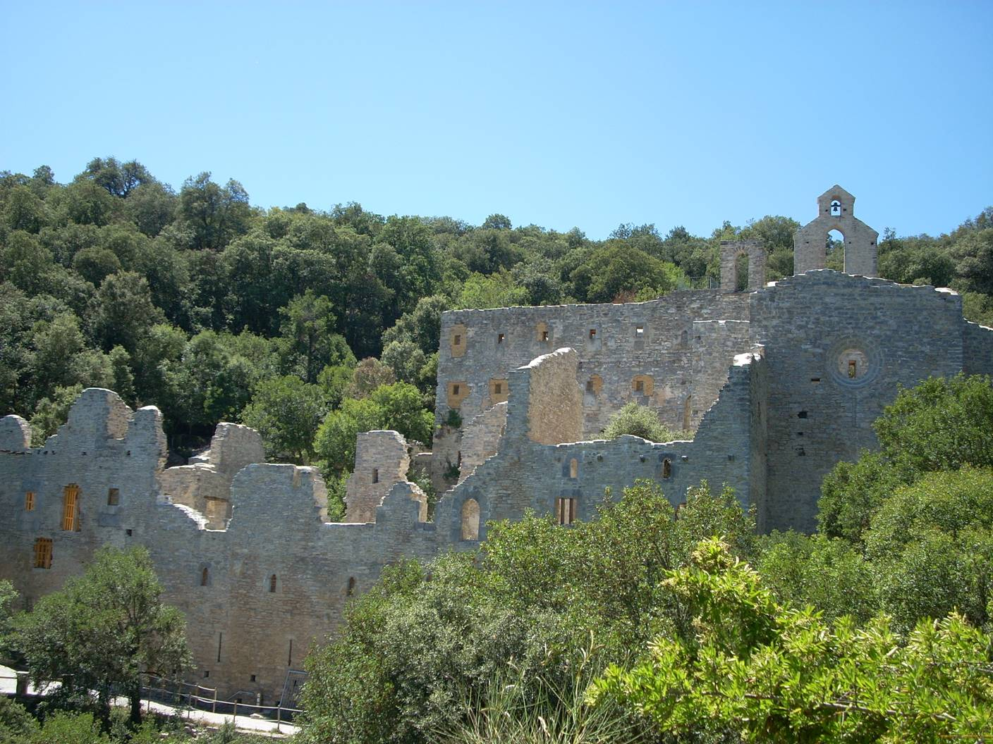 Ruinas del convento del Jardín Botánico de Santa Catalina